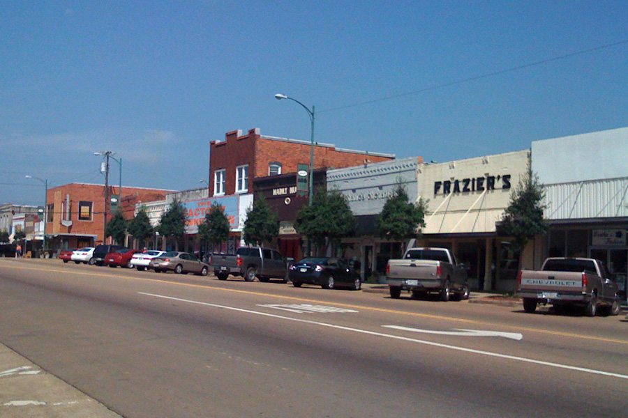 Main Street in Louisville, Mississippi